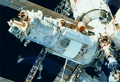 Модуль "Природа" в космосе